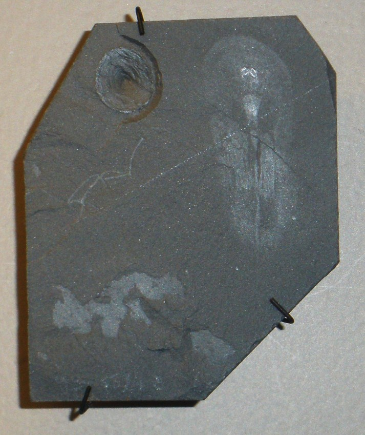 Fossil of Odontogriphus, an extinct animal Took the photo at Musee d'Histoire Naturelle, Brussels